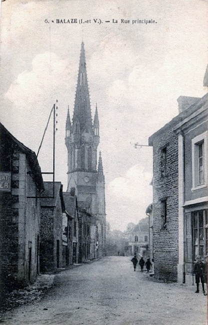 La rue principale de Balazé vers 1900 (carte postale Neurdein frères)